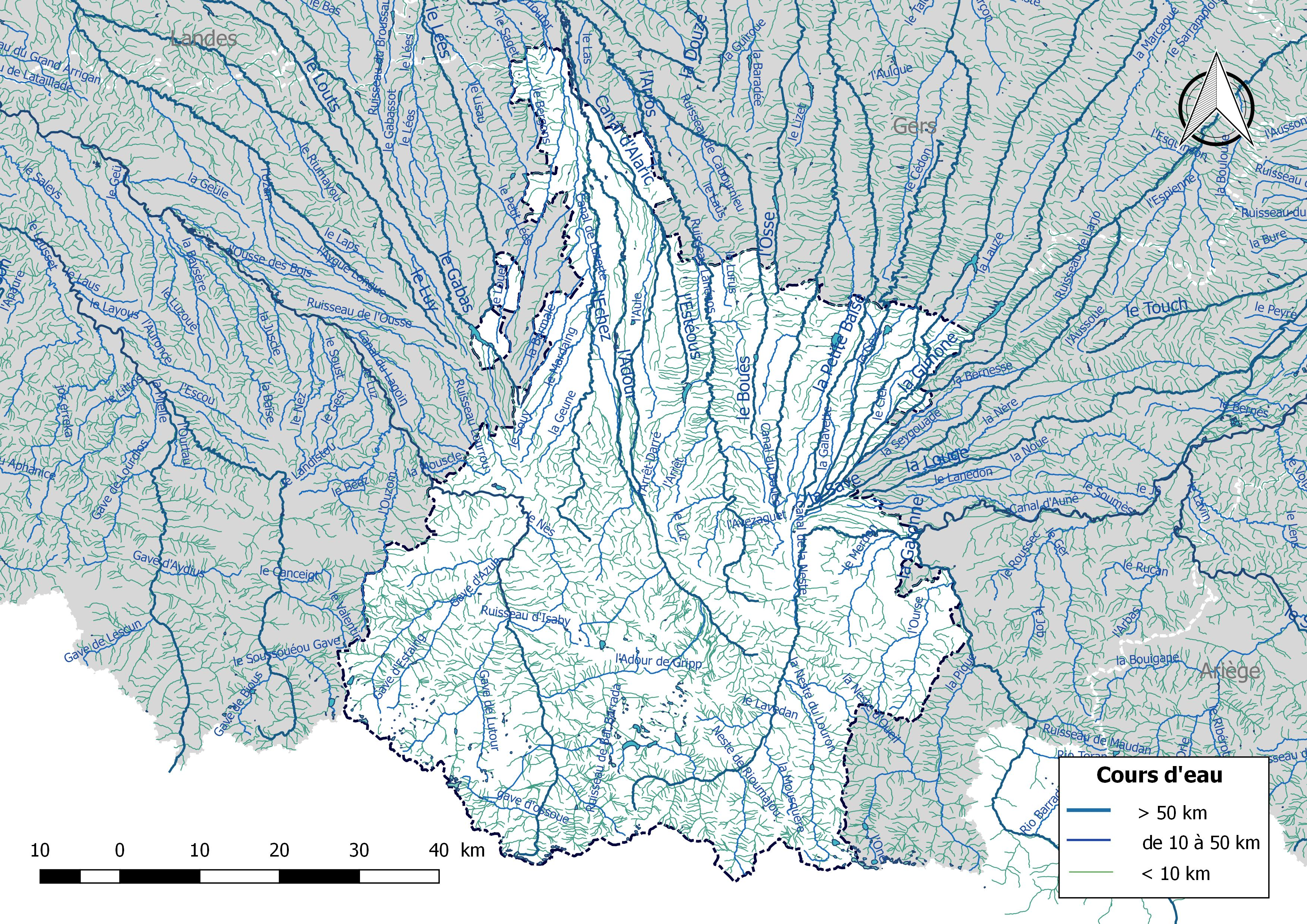 Réseau hydrographique du département des Hautes-Pyrénées (France).